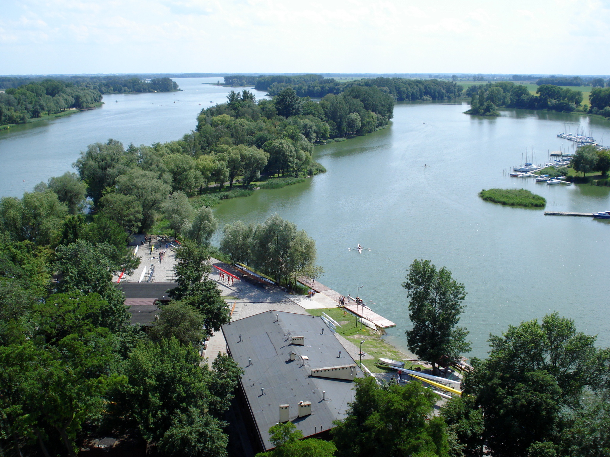 widok z Krzywej Wieży w Kruszwicy